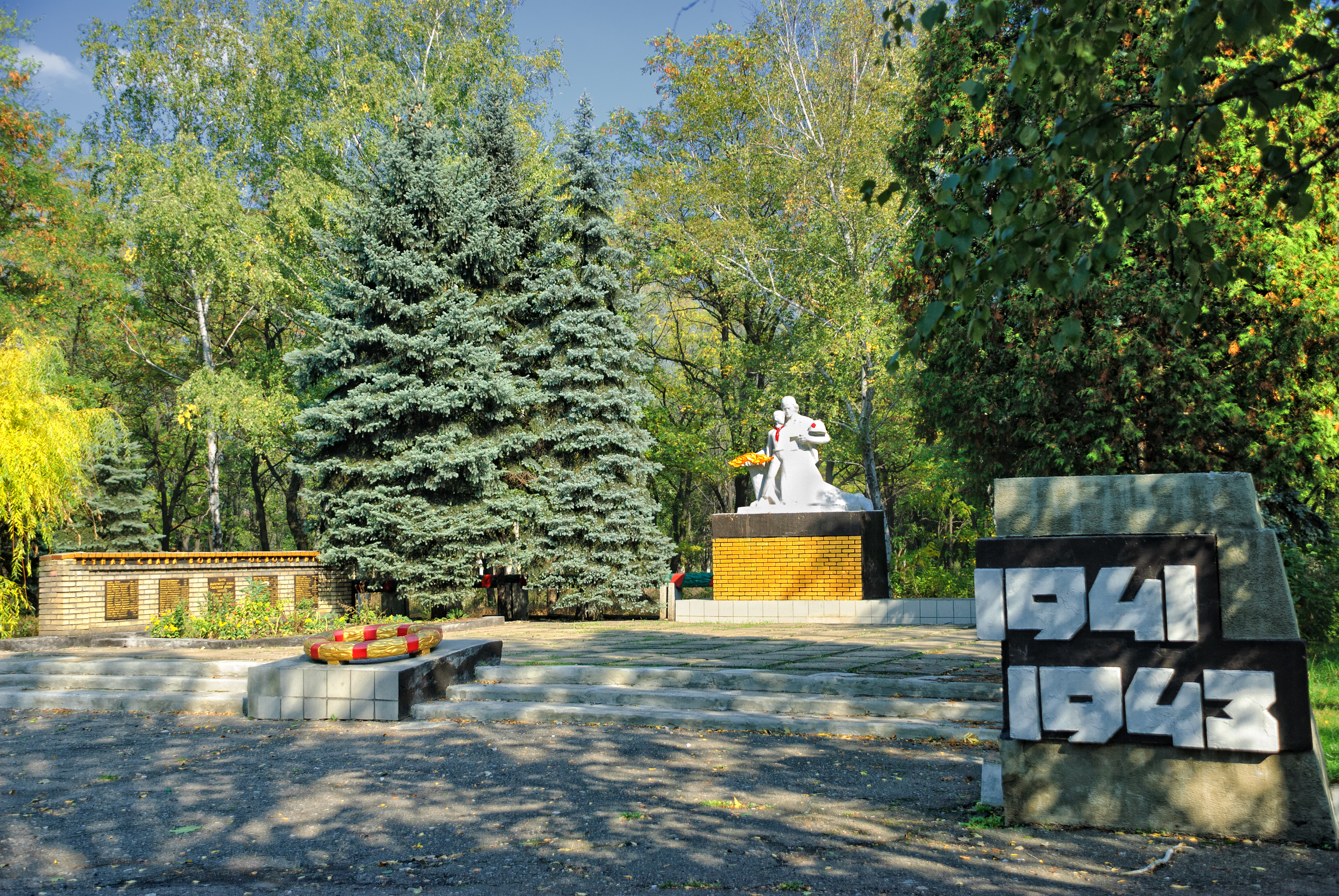 Меморіал на честь радянських воїнів Південно-Західного фронту і воїнів-земляків., Білицьке